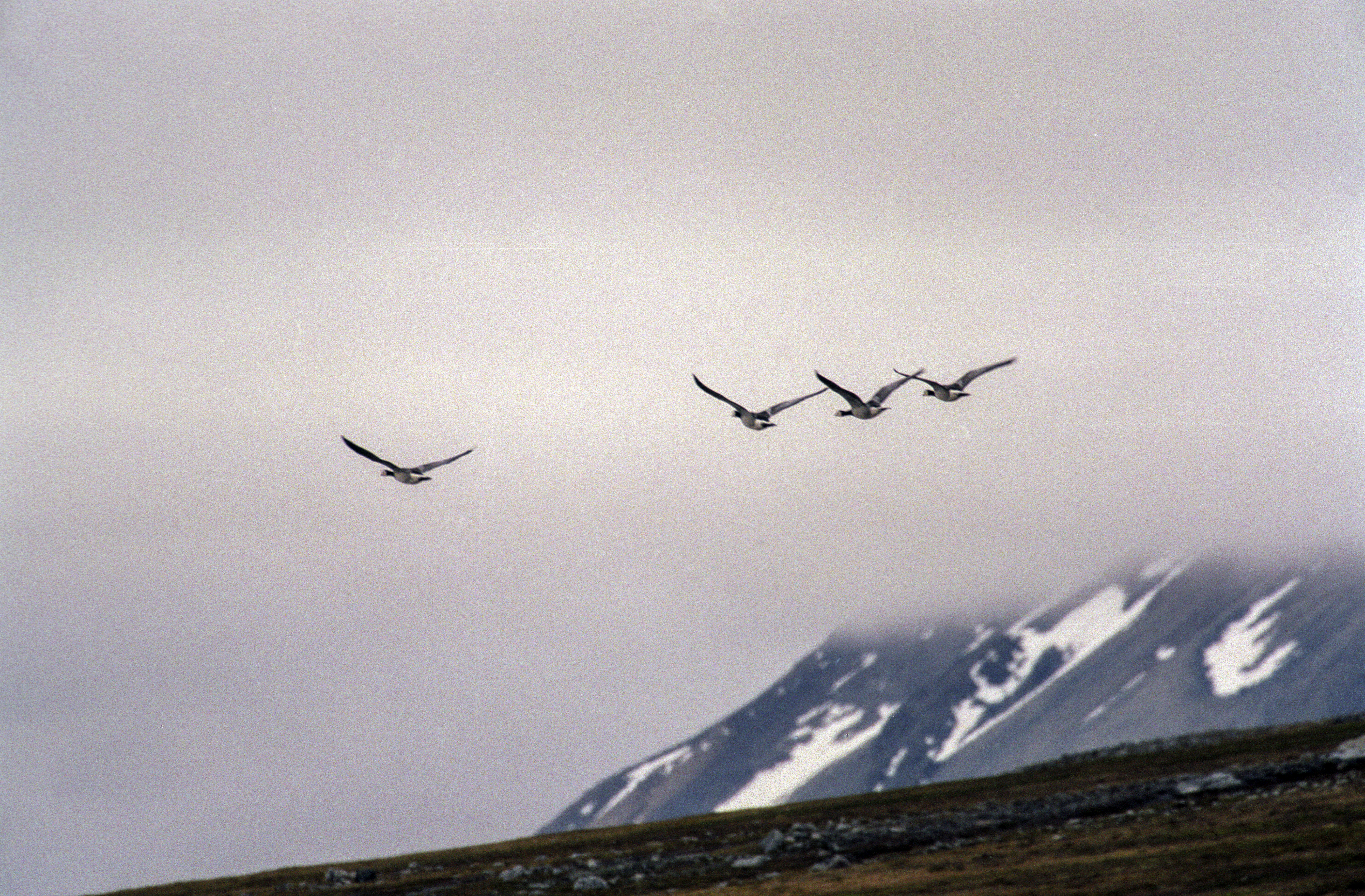 Barnacle Goose, spitsbergen